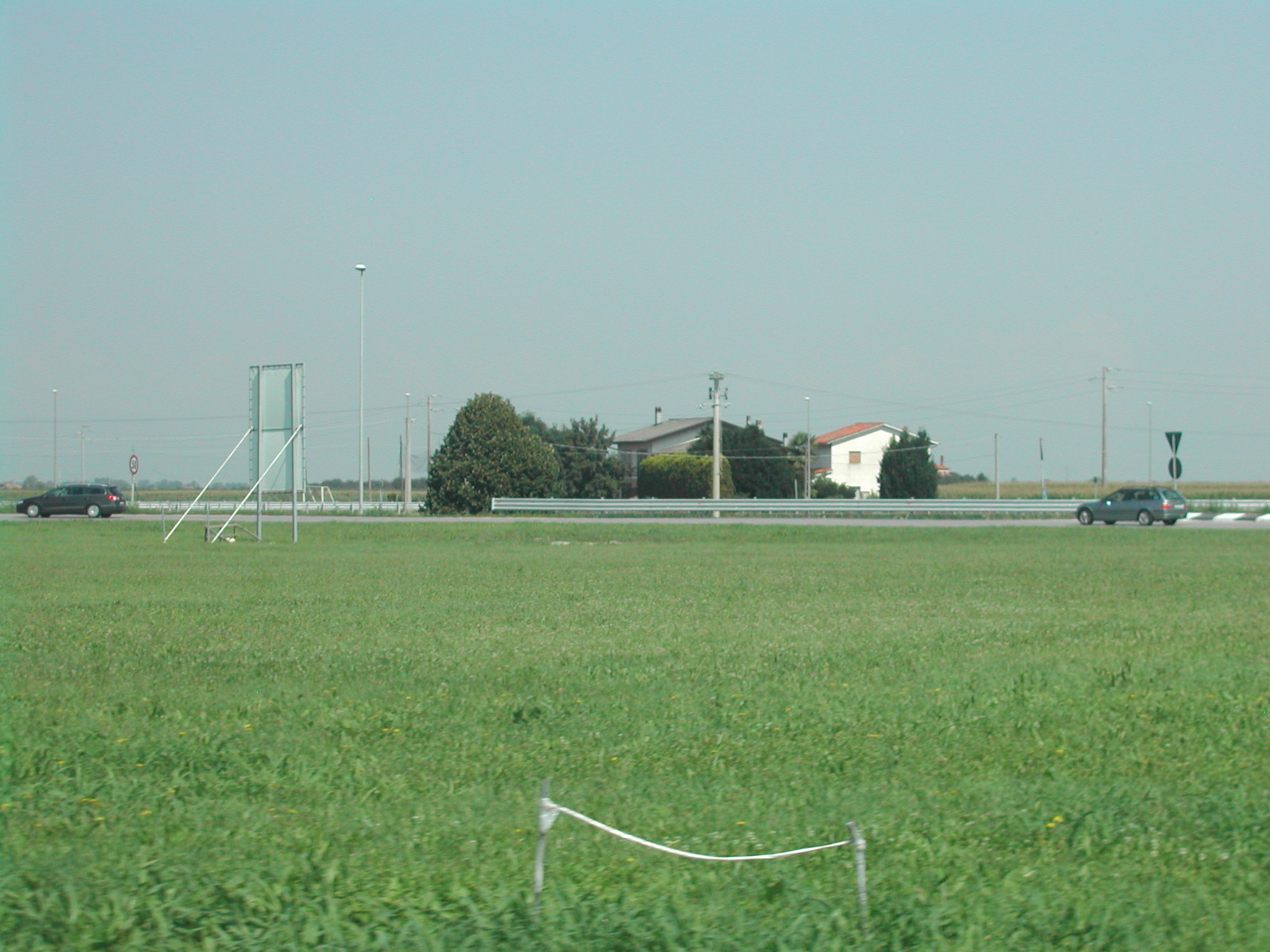 Venez. Ebene